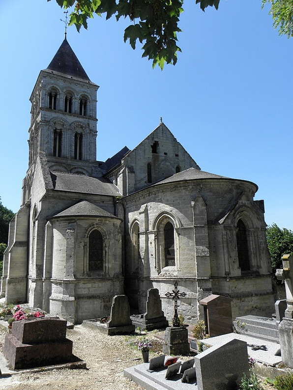 Vue méridionale du chevet de l'église Saint-Martin de Nouvion-le-Vineux (02).